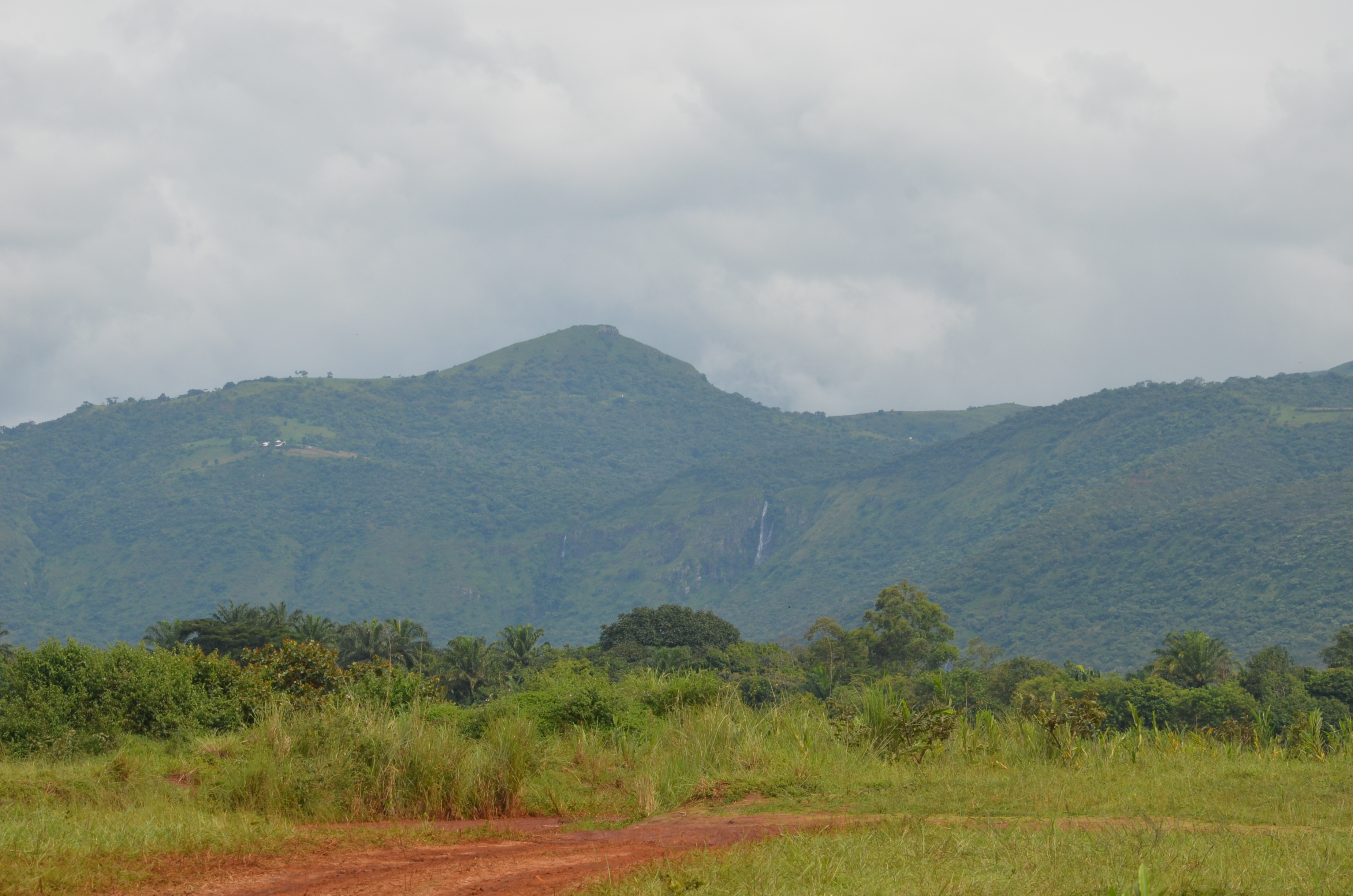 Dans les alentours du montagne du lac de cratère à Koutaba dans le noun, à l'Ouest du Cameroun